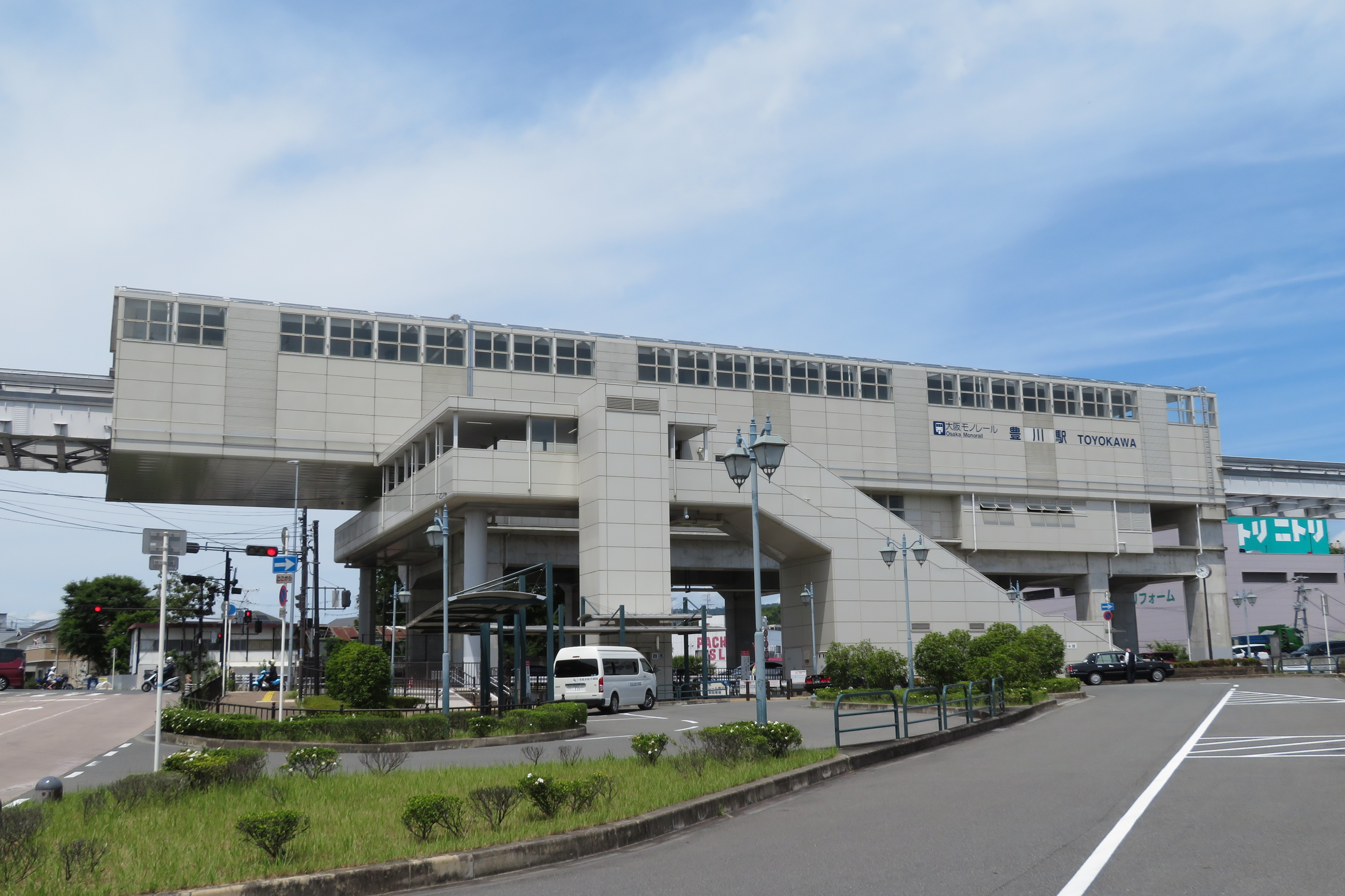 大阪モノレール豊川駅